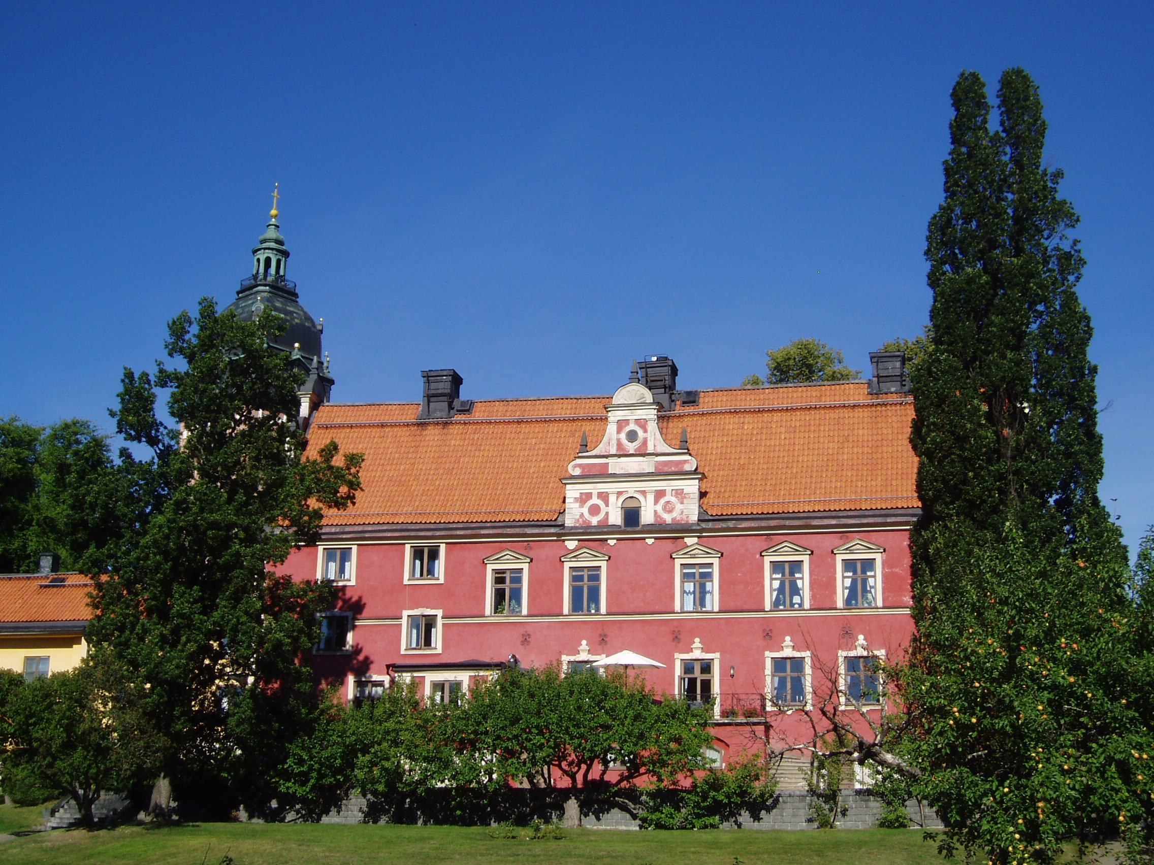 Biskopsgården, Strängnäs (Bispen 3)